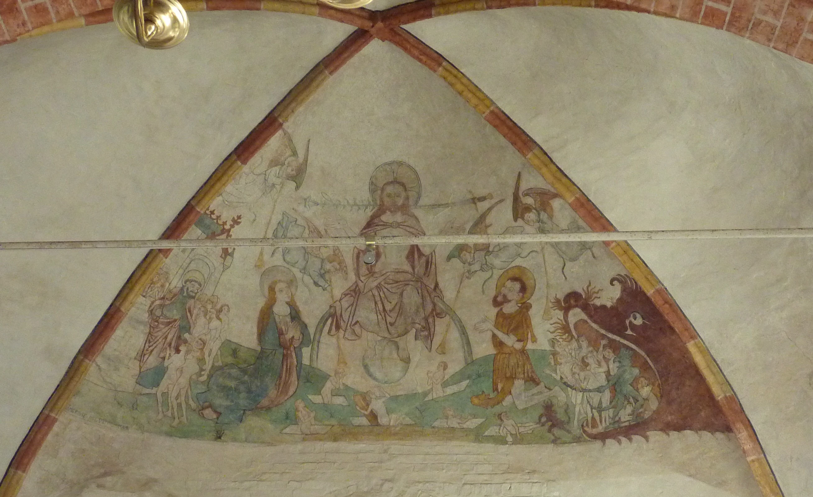 Fresko in St. Johannes in Bad Zwischenahn